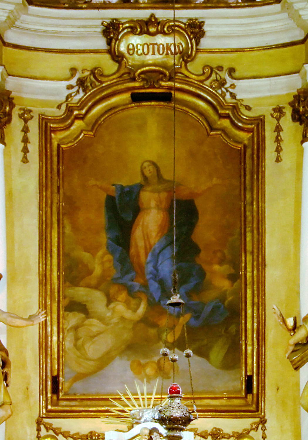 Lwówek, kościół parafialny, obraz "Wniebowzięcie NMP" z 1860 r. pędzla Władysława Simona w ołtarzu głównym (Władysław Simon, "Assumption of Mary", in high altar)